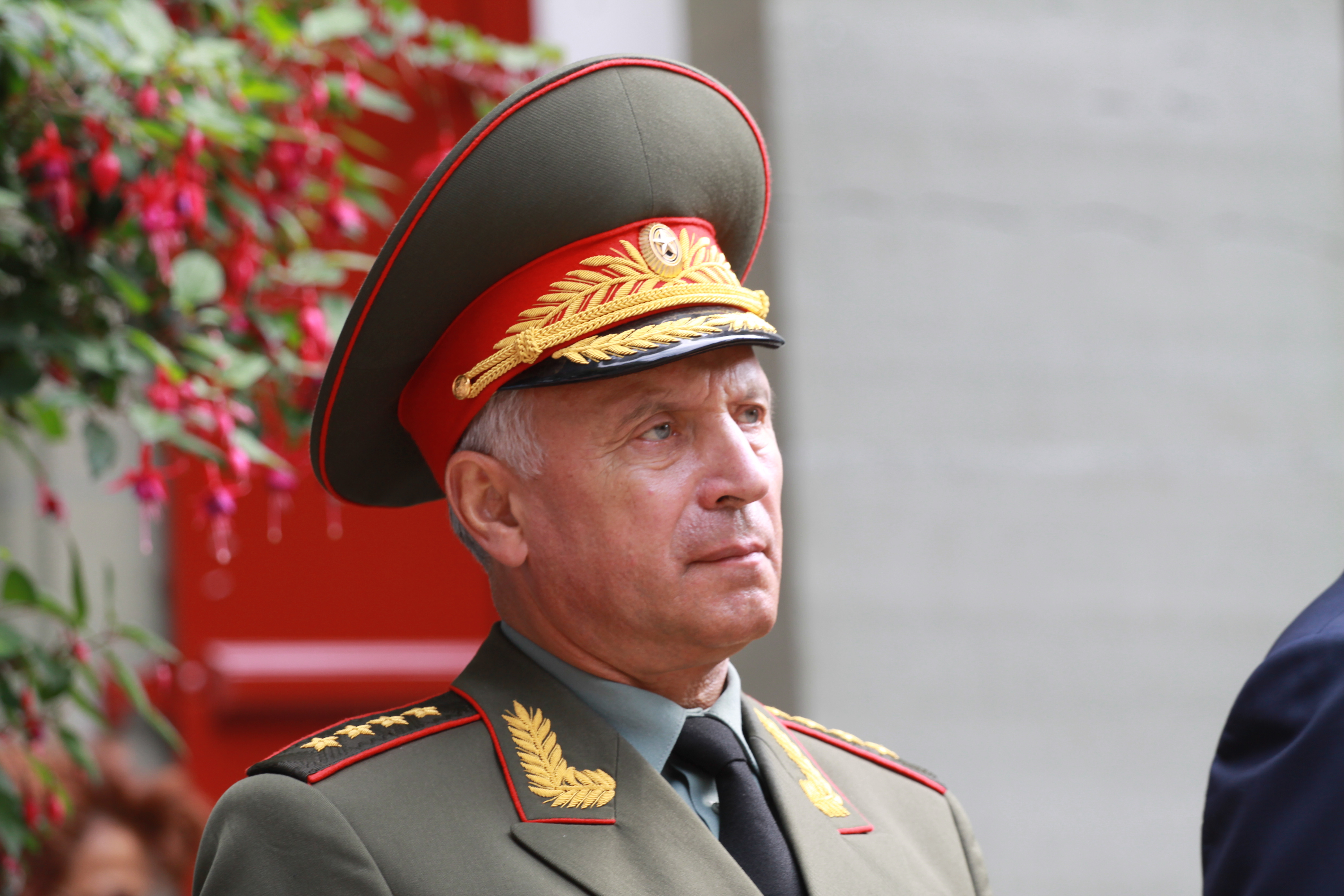 Zuerich, CHE, 21.09.2009: Praesident Dmitri Medwedew beim Staatsbesuch in der Schweiz Der russische Generalstabsschef Nikolai Makarow beim Staatsbesuch von Praesident Dmitri Medwedew im Landgut Lohn in Bern. [ (c) Juerg Vollmer / maiak - The Newsroom, Postfach 5093, 8045 Zuerich, fon: +41 44 586 11 43, ; You are free to copy, distribute and transmit the foto free of charge with attribute by the author and . ; ArchivNr.: Staatsbesuch Dmitri Medwedew - 18 ; ]